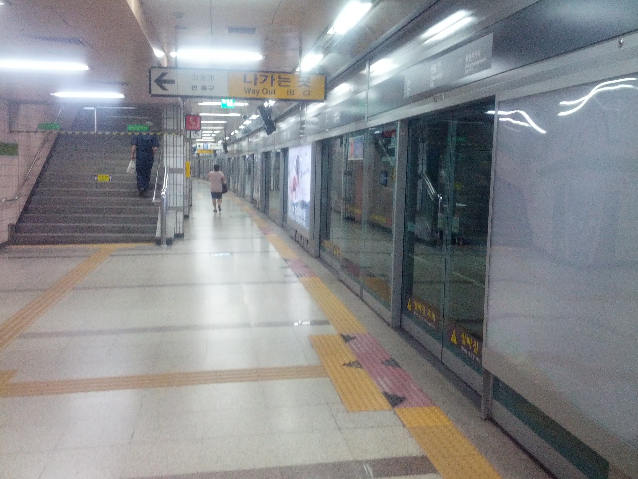 천왕역 승강장